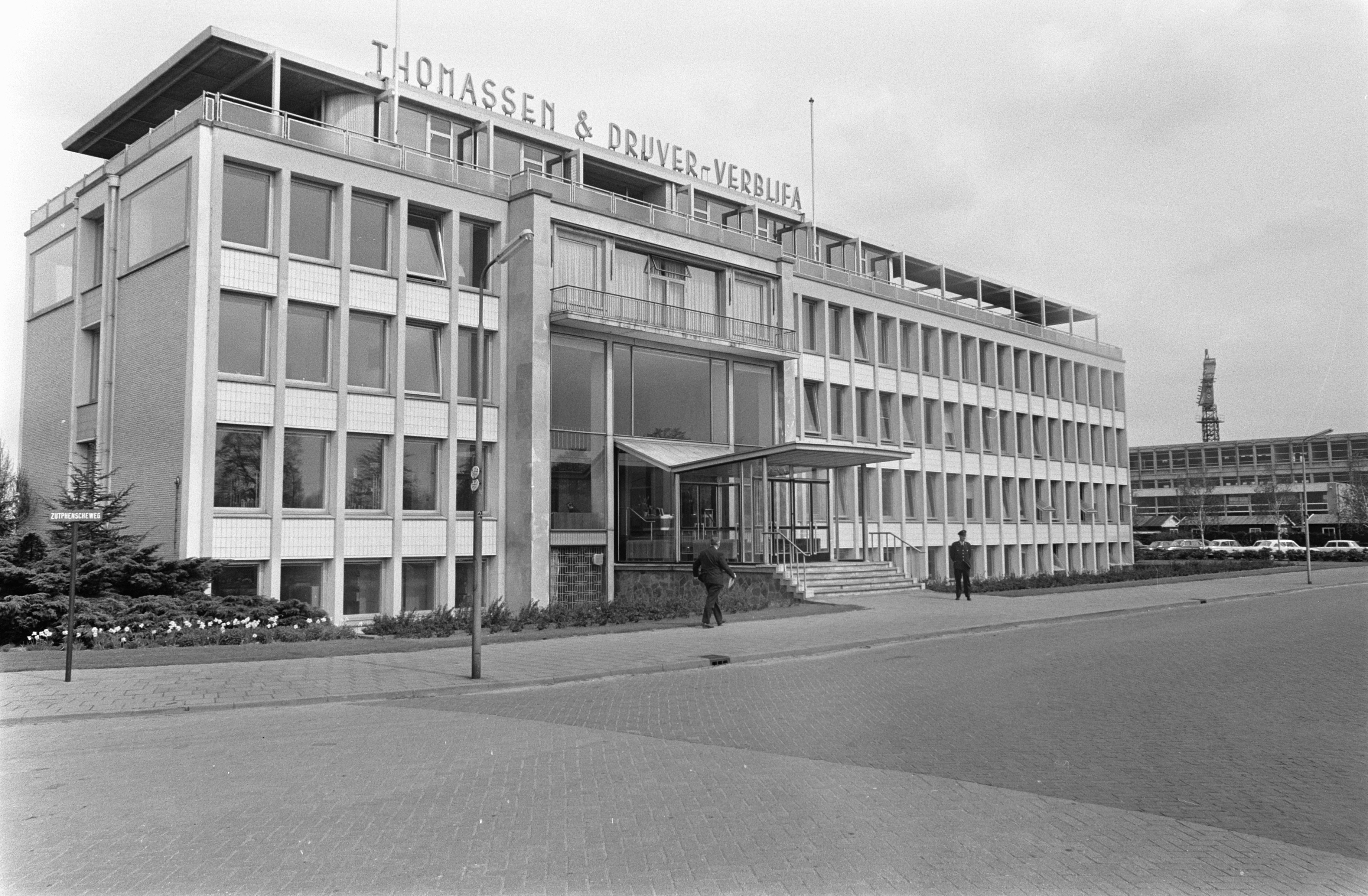 Collectie / Archief : Fotocollectie Anefo Reportage / Serie : [ onbekend ] Beschrijving : Dr. A. Vondeling op aan aandeelhoudersvergadering Thomassen-Drijver-Verblifa te Deventer nr. 2 , 3: fabriek exterieur Thomassen, Drijver, Verblifa / Datum : 7 mei 1969 Locatie : Deventer, Overijssel Trefwoorden : fabrieken Persoonsnaam : Drijver, F.A., Haar, B. ter, Thomassen en Drijver Verblifa, Vondeling, A. Instellingsnaam : Thomassen & Drijver-Verblifa Fotograaf : Evers, Joost / Anefo Auteursrechthebbende : Nationaal Archief Materiaalsoort : Negatief (zwart/wit) Nummer archiefinventaris : bekijk toegang 2.24.01.05 Bestanddeelnummer : 922-3903